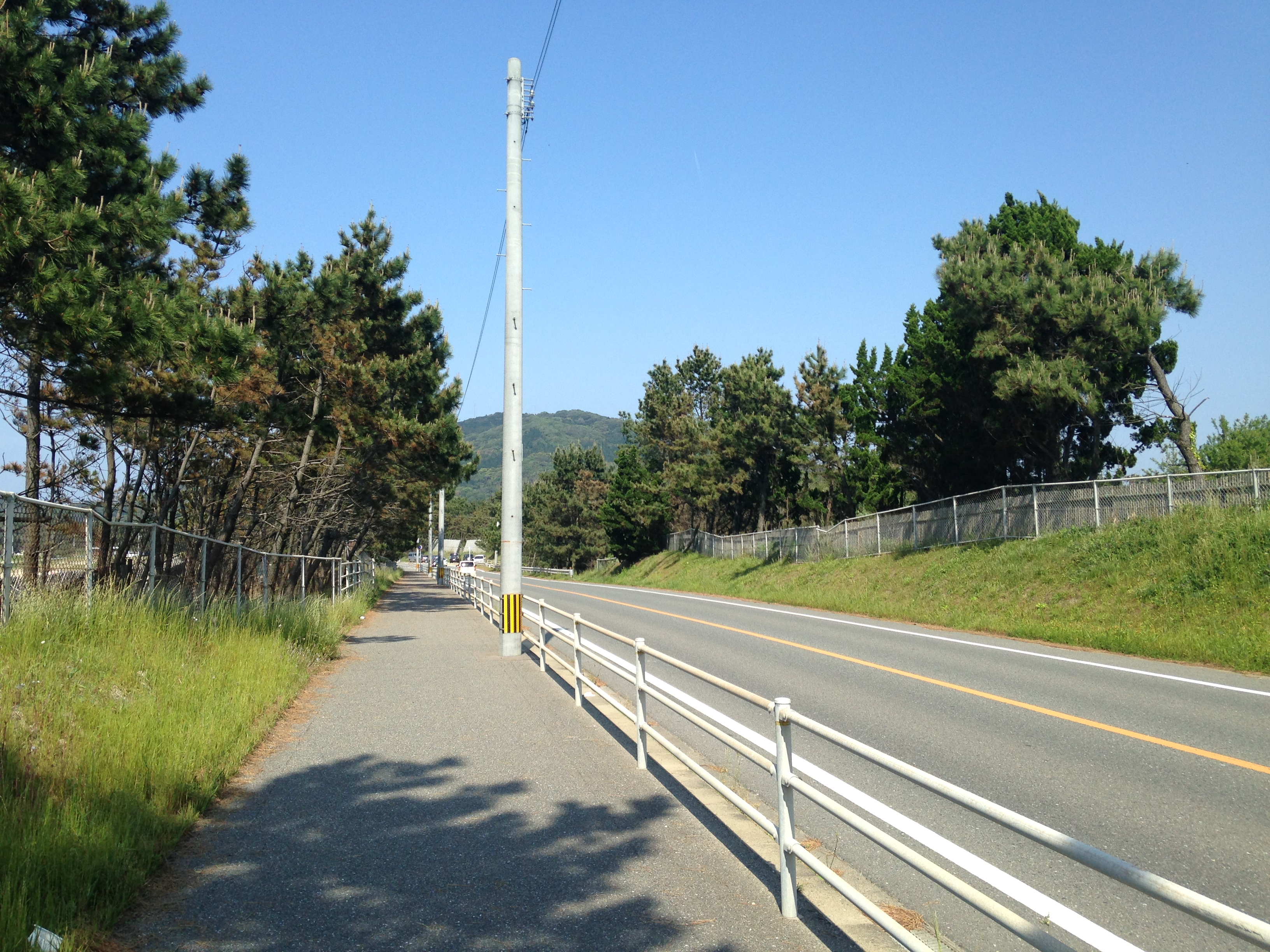 西浦浜付近の福岡県道54号と松原